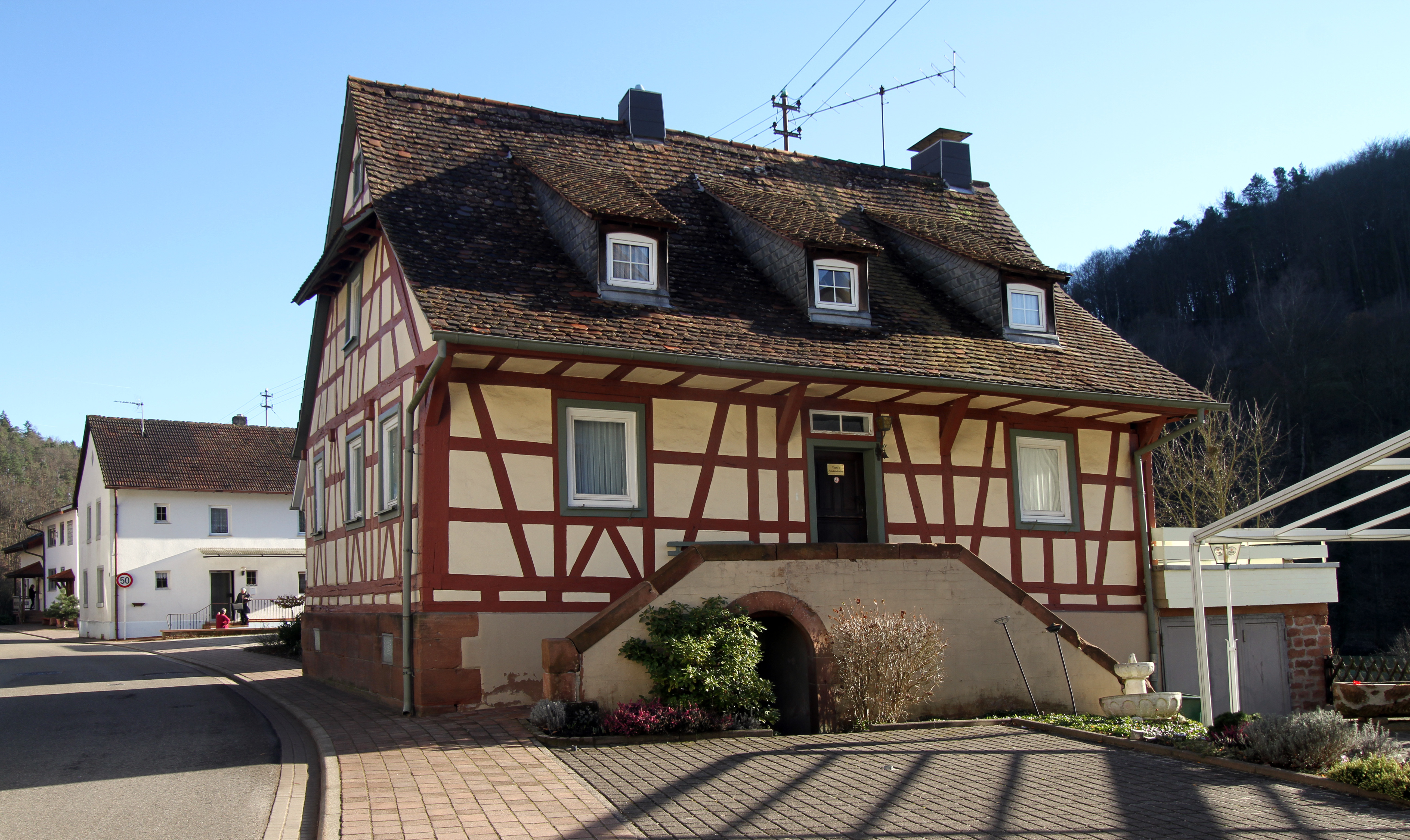 Schönau (Pfalz)